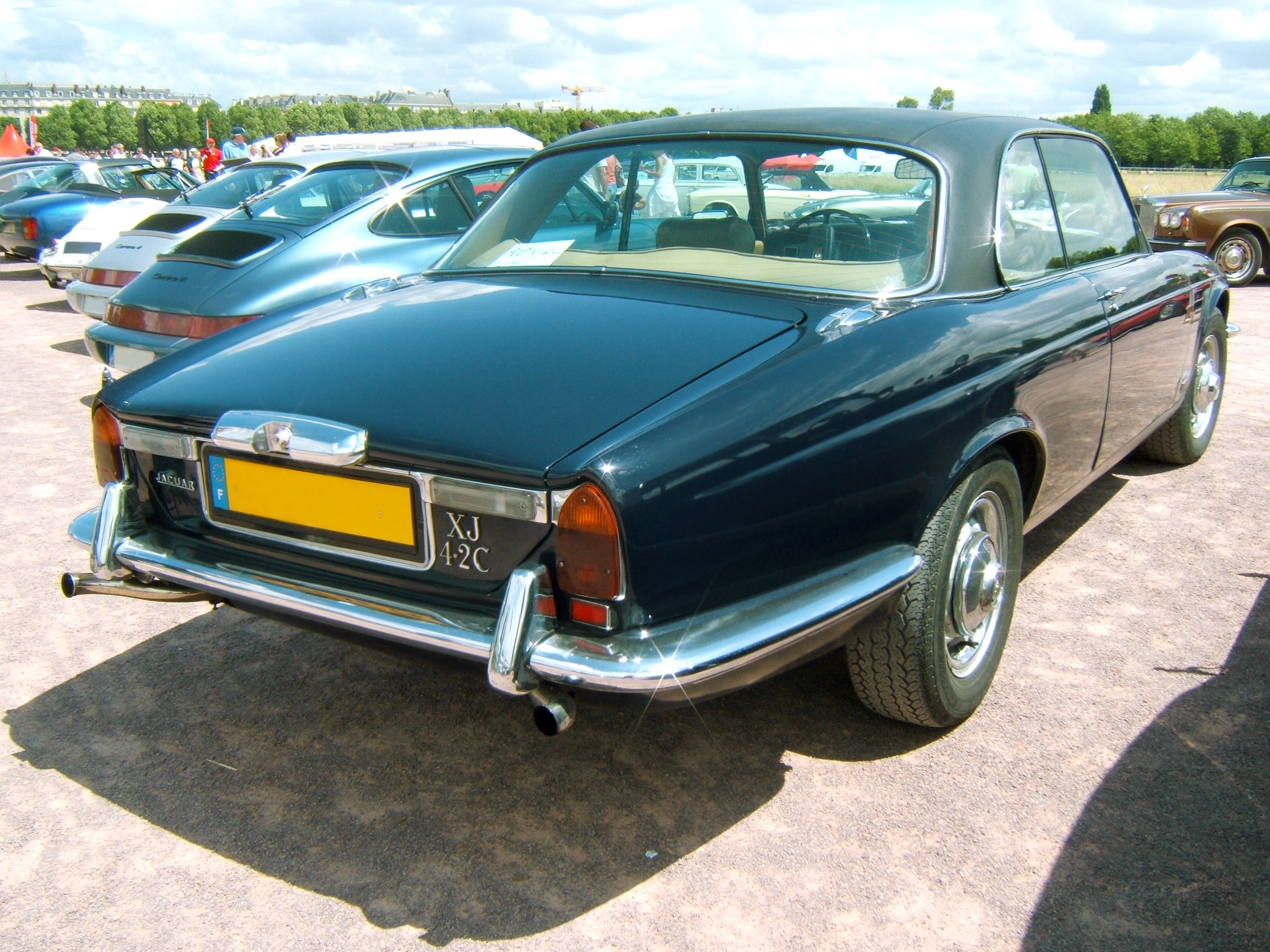 Jaguar XJ 4.2 C vue de 3/4 arrière.